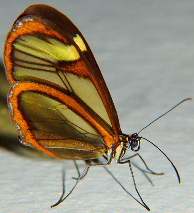 Borboleta transparente - Greta oto - The Glasswing